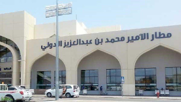 مطار الأمير محمد أبو شرين - مطار المدينة